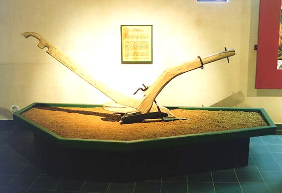 Arar goad implijet e Rossello en XXvet kantved.